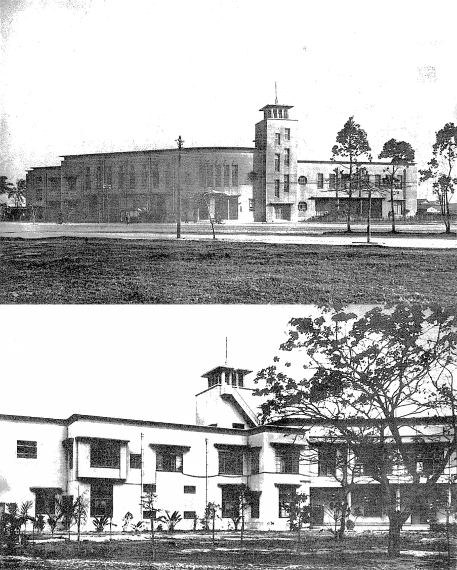 中文（台灣）: 1938年新築的高雄州商工奬勵館正面與背面圖